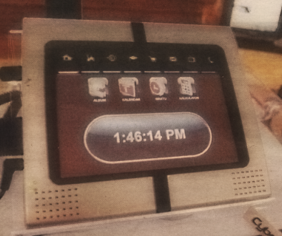 Makcik PC